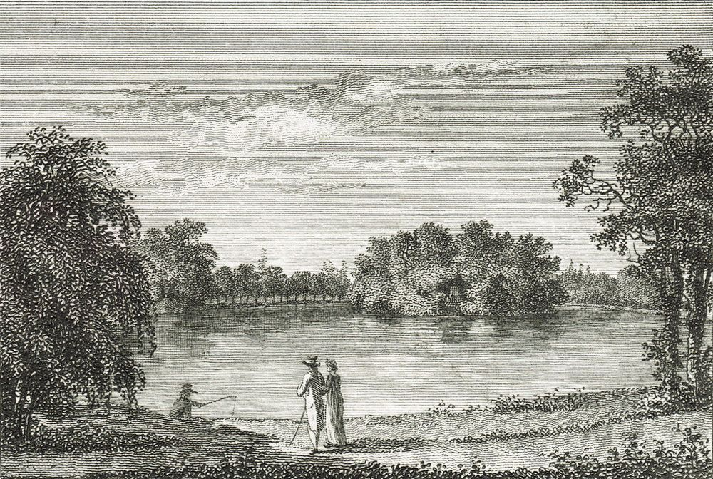 Die Insel im Trierschen Garten in Leipzig